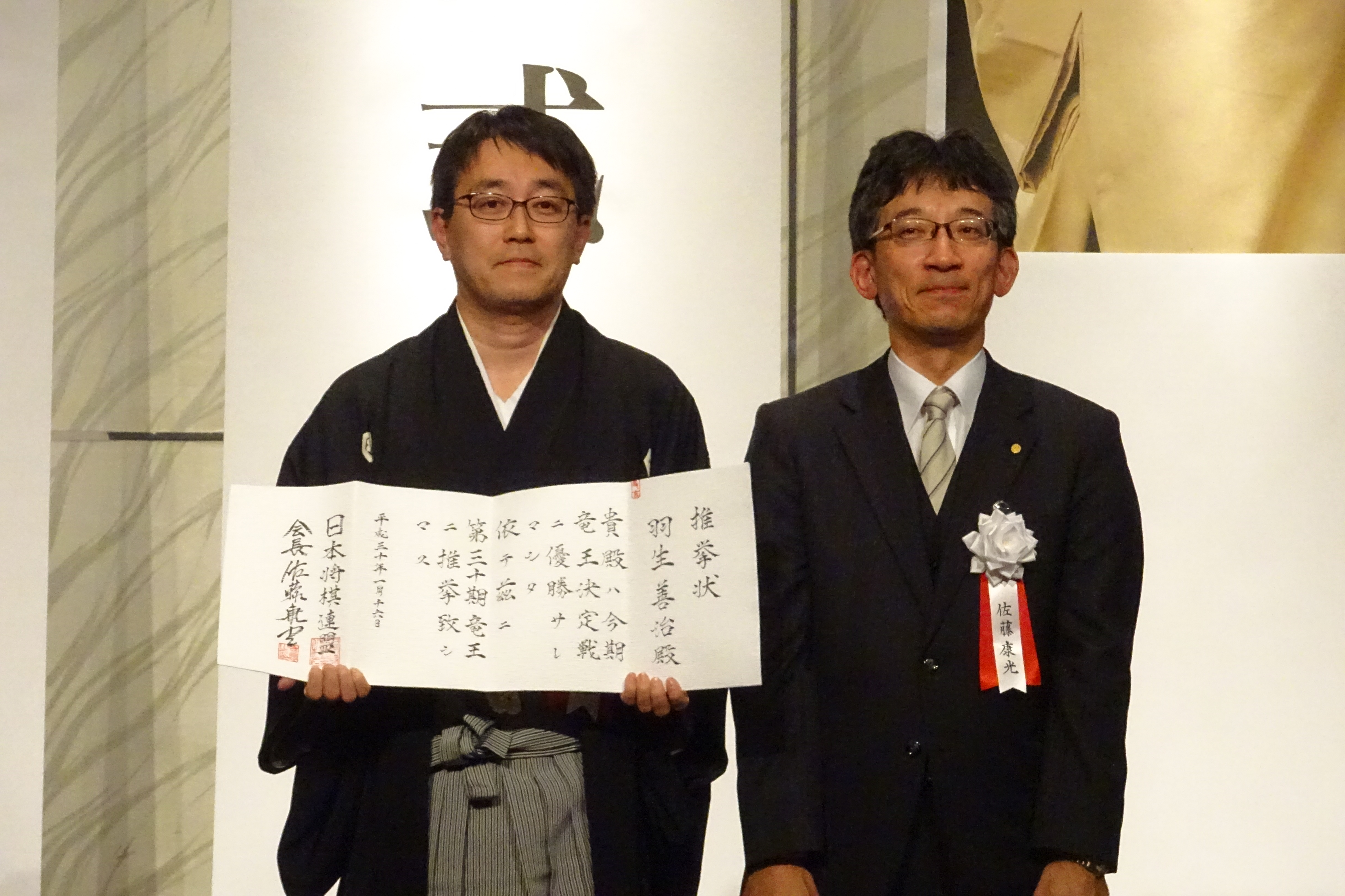 羽生善治 2018年 竜王就位式に於いて